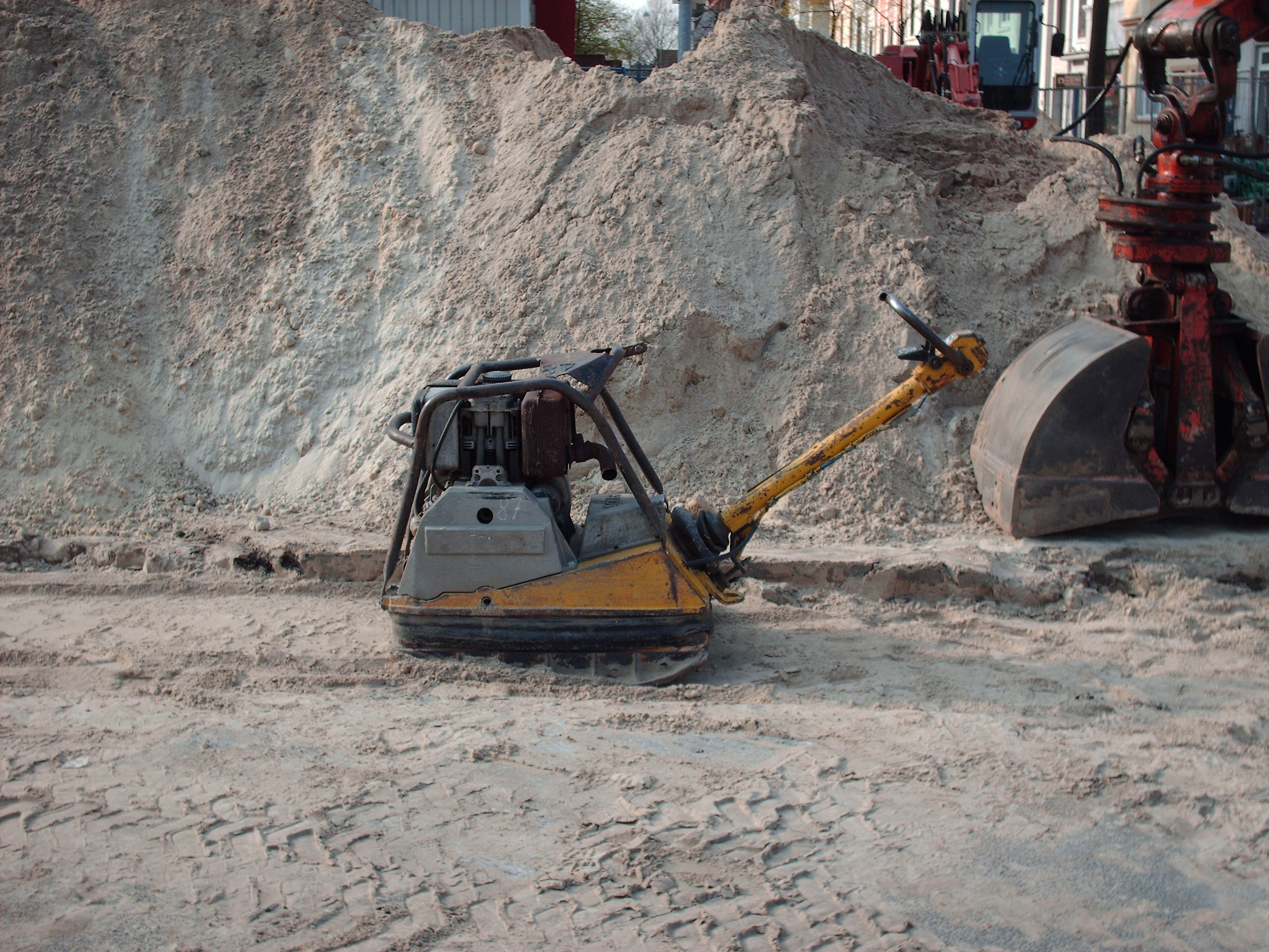 Pladevibrator